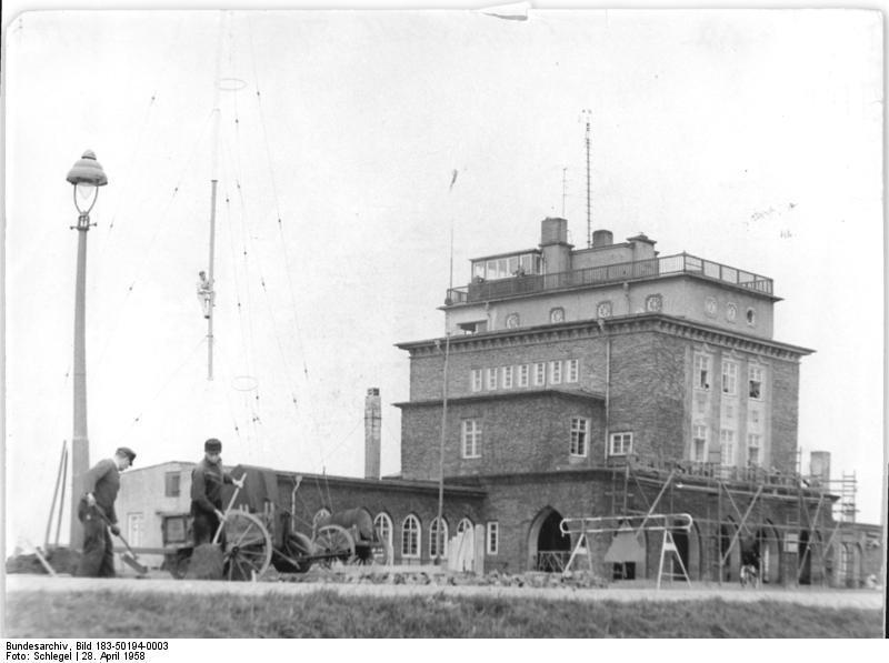 Chemnitz, Flughafen im Bau Interflug - ab 1.9.1963 Zentralbild-Schlegel 28.4.1958 Eröffnung einer Fluglinie steht bevor Am 2. Mai wird eine weitere Inland-Fluglinie der Deutschen Lufthansa eröffnet. Von Karl-Marx-Stadt aus fliegen ab 2. Mai täglich 2 Maschinen nach Berlin und je eine nach Leipzig und Dresden. Gegenwärtig werden auf dem Flugplatz die letzten Arbeiten verrichtet. UBz: Blick auf das Flugplatzgebäude und die Sendeanlage.